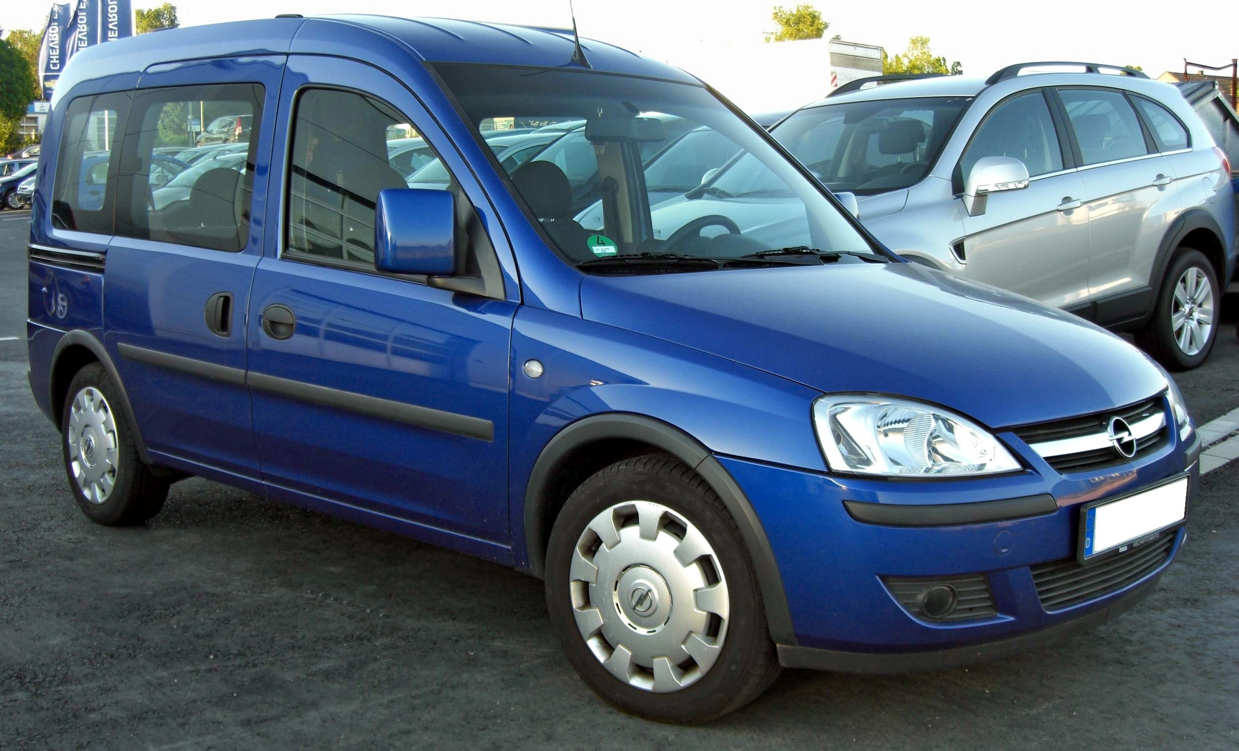 Opel Combo C